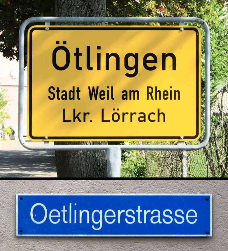 Gegenüberstellung des Ötlinger Ortsschildes mit dem Strassenschild in Basel.